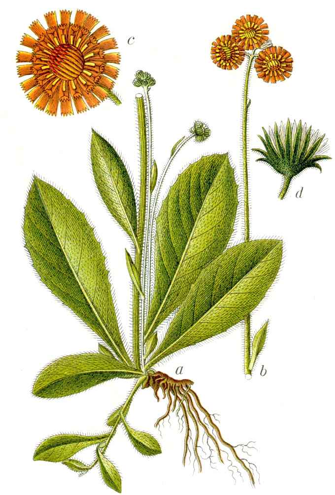 Hieracium aurantiacum L. Original Caption Spanisches Mauseohr, Hieracium aurantiacum